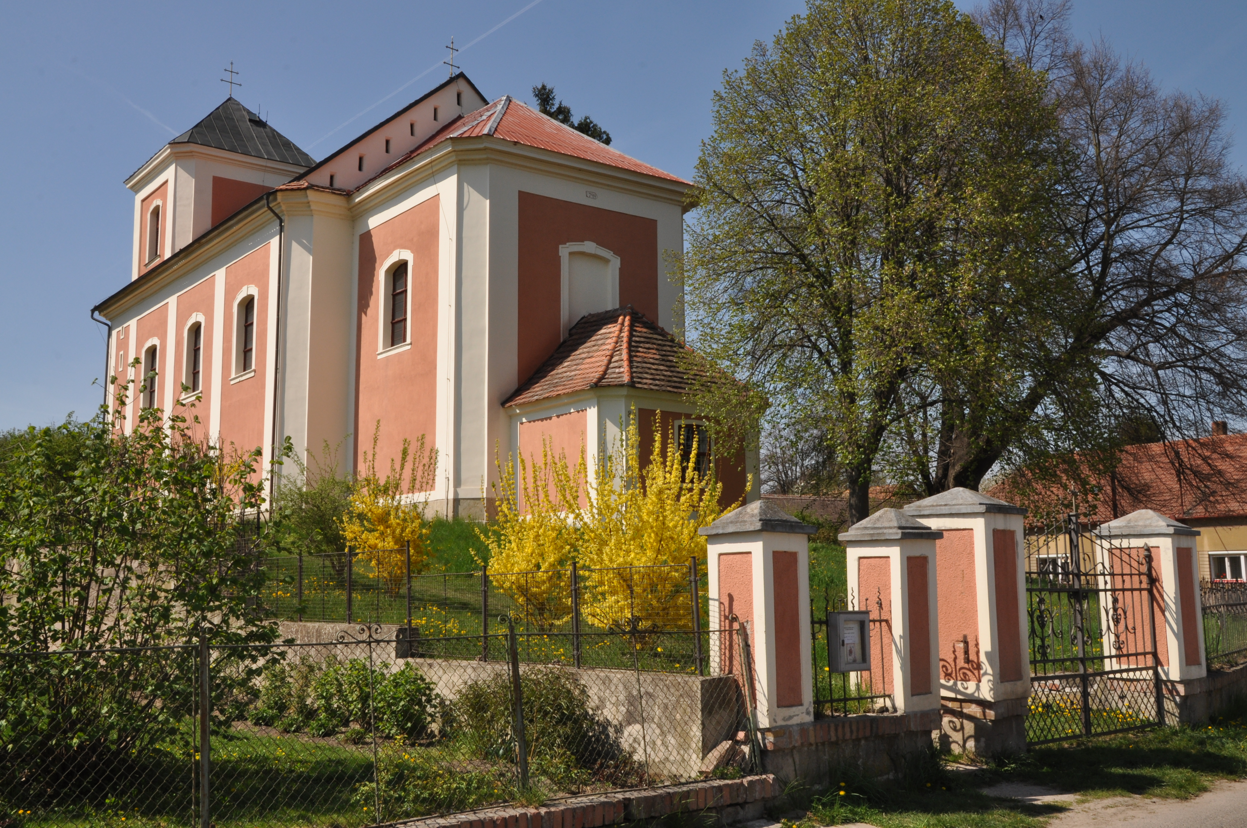 Kostel sv. Michala v Trojovicích, okres Chrudim